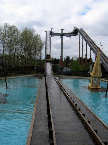 Water ride